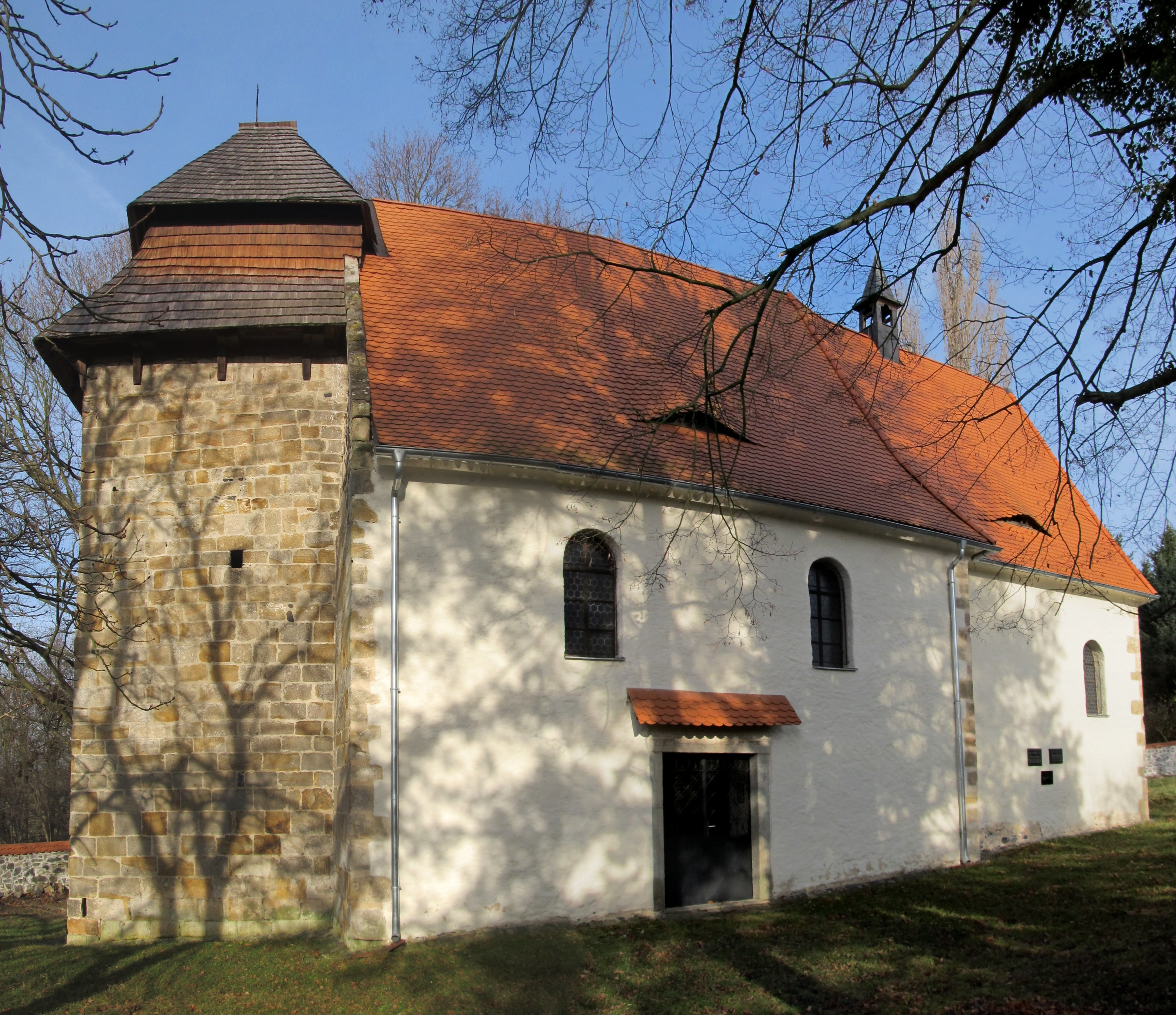 Vícov - románský kostel svatého Ambrože